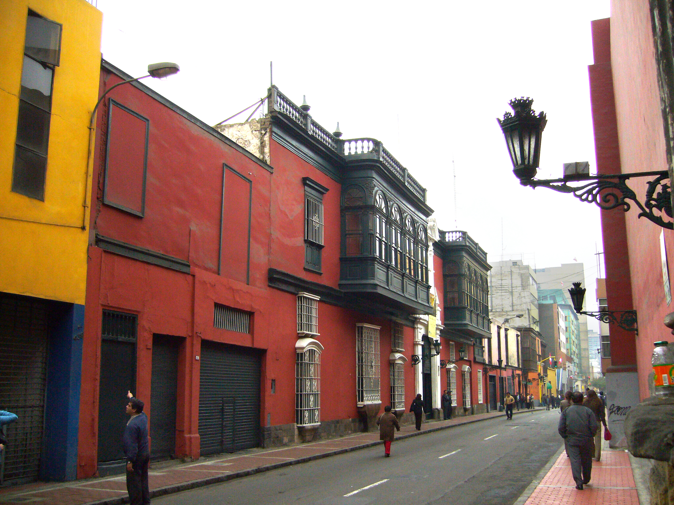 Descripción: Casa Riva Agüero Lugar: Centro Histórico de Lima Distrito : Cercado de Lima Ciudad : Lima País : Perú Fotógrafo: © Manuel González Olaechea y Franco Fecha de la foto : 11 de julio de 2007